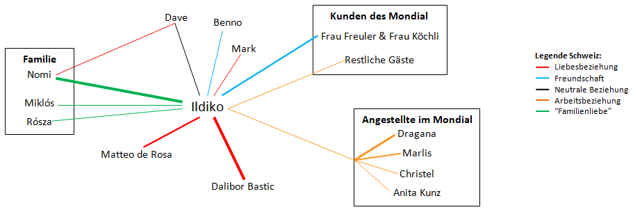 Figurenkonstellation der Figuren aus der Schweiz aus Melinda Nadj Abonji's Roman "Tauben fliegen auf"